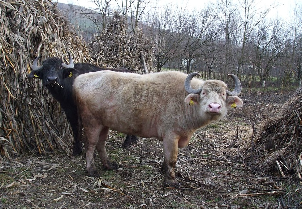 Buffles domestiques Bubalus bubalis en Roumanie, d'après [1], December 1, 2009, appartenant à Alex Corpodean